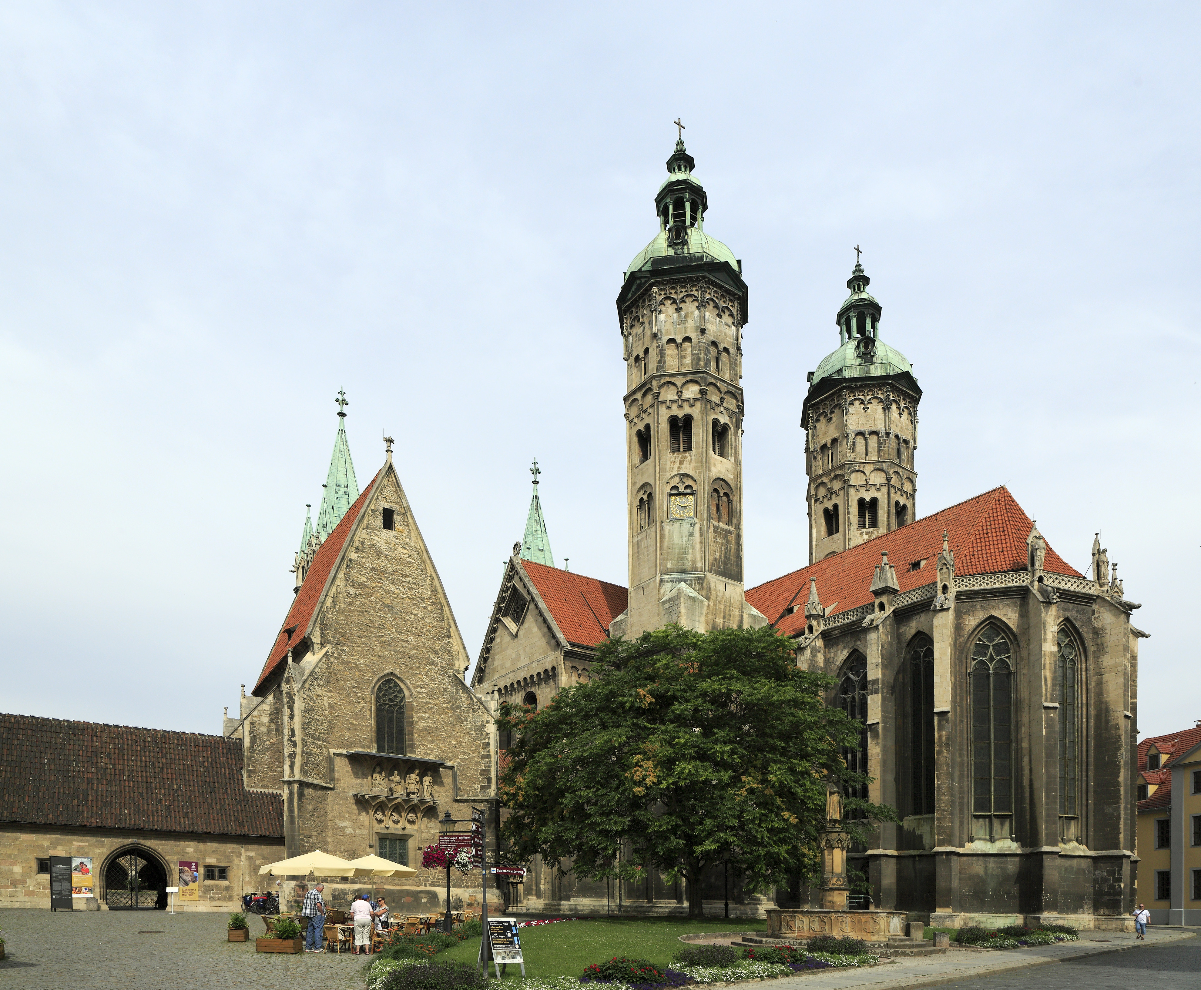 Vom Domplatz, der spitze Giebel links ist die Dreikönigskapelle. Rechts der Ostchor mit den Osttürmen, davor steht der Ekkehardbrunnen. Ganz links liegt der Besuchereingang, er führt in den Kreuzgang. Das Torgebäude entstand als späte Zugabe erst 1936 bis 1940.